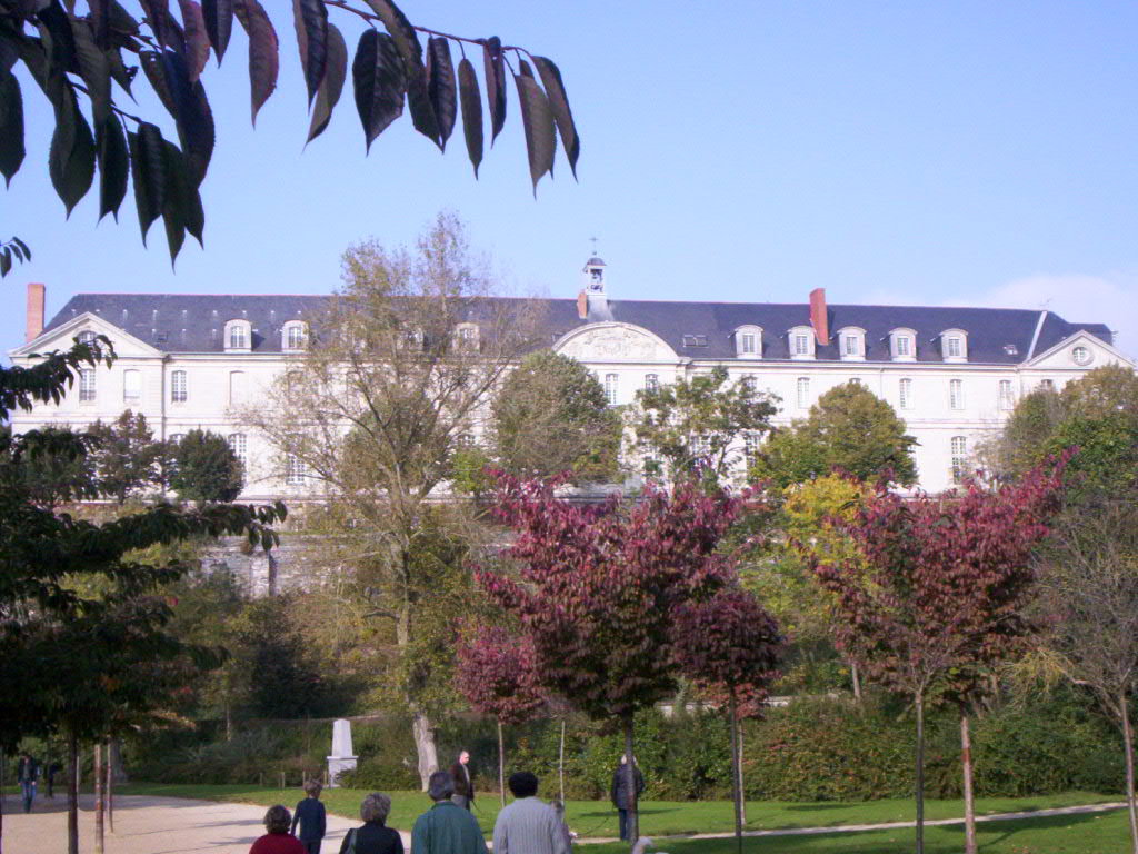 Abbaye Saint-Nicolas à Angers